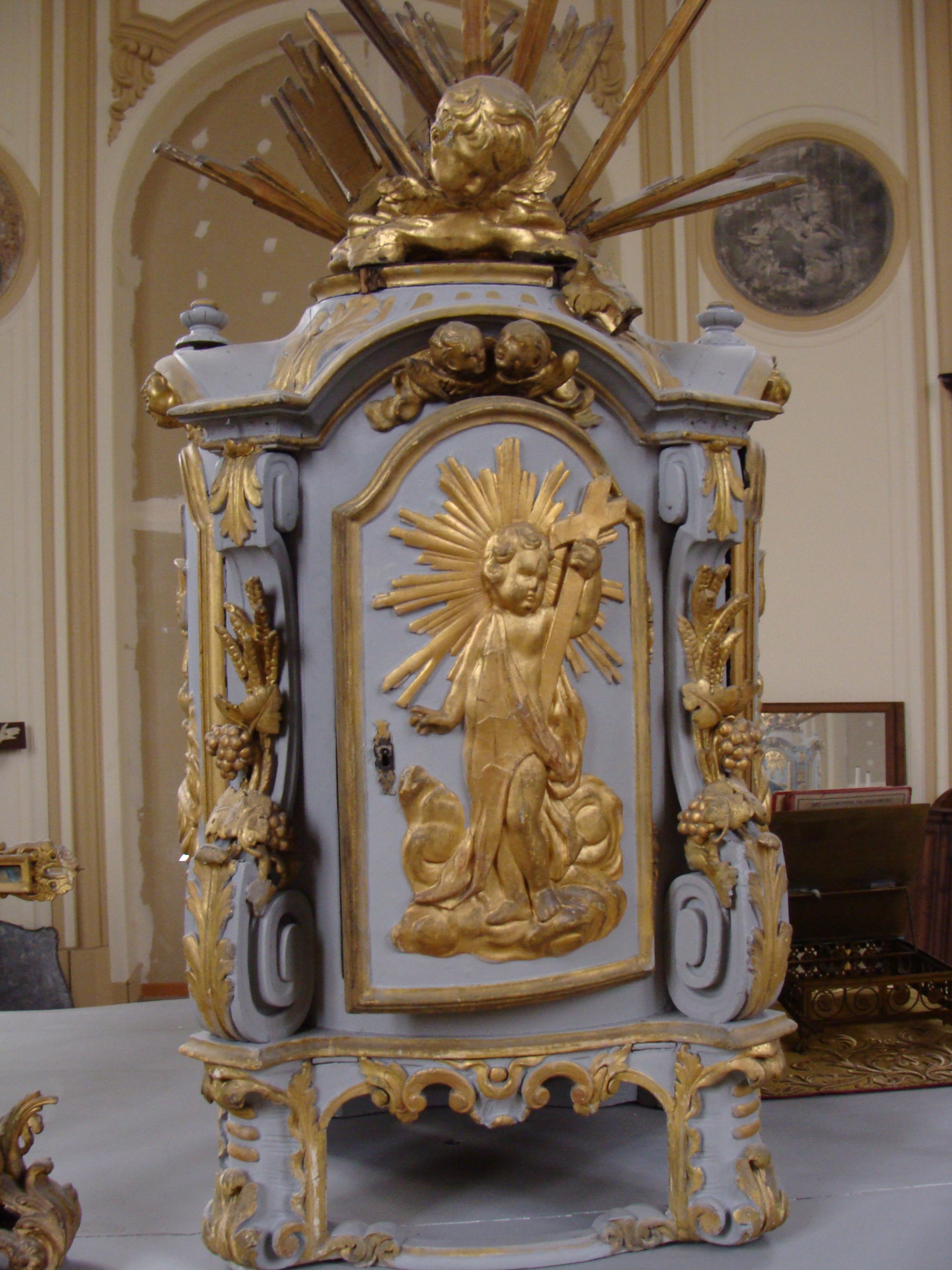 Tabernacle de l'Abbaye d'Anchin situé dans l'Hôpital-Général de Douai